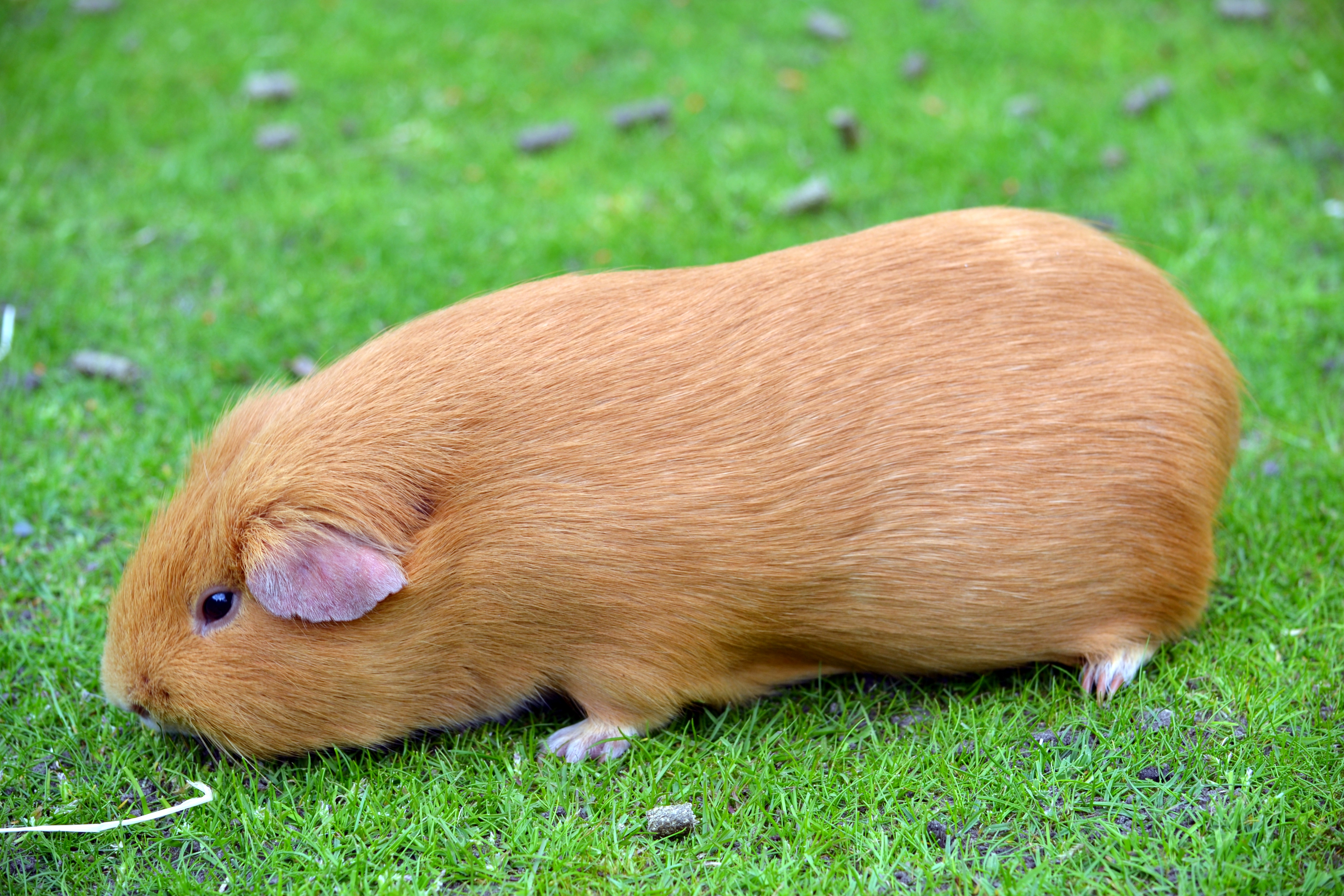 Deze foto is gemaakt tijdens een bezoek aan kinderboerderij De Kooi (Rotterdam). This picture was taken during a visit to the petting zoo De Kooi (Rotterdam).